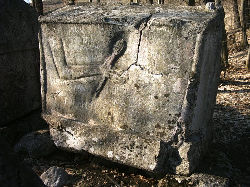 Главни стећак Војводе Момчила